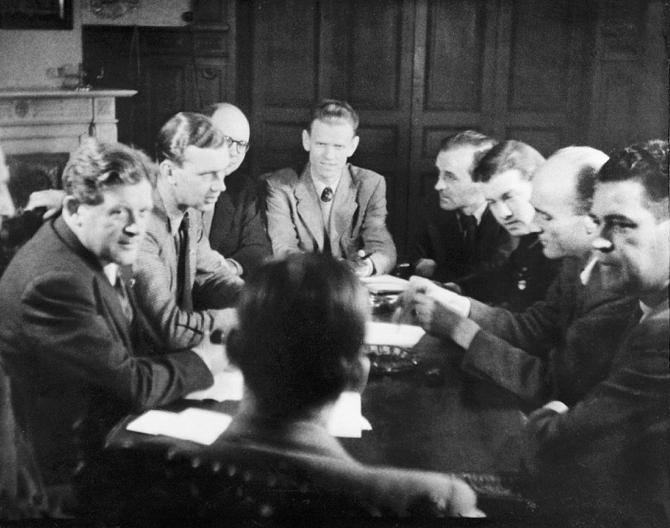 Kontaktudvalget i Stockholm, oprettet i efteråret 1943. Som nr. to fra venstre ses Niels Bjarke Schou. Nr. tre fra højre er Svenn Seehusen, nr.to fra højre, Volmer Gyth og med ryggen til, Ebbe Munck. Sted: Stockholm Dato: Efteråret 1943 Se flere billeder her: Rights: More about The Museum of Danish Resistance (Frihedsmuseet)